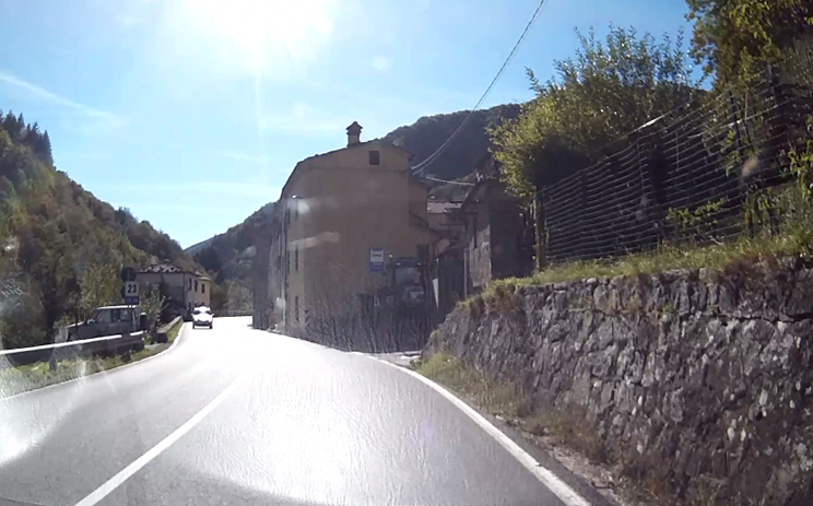 frazione Casa Morotti